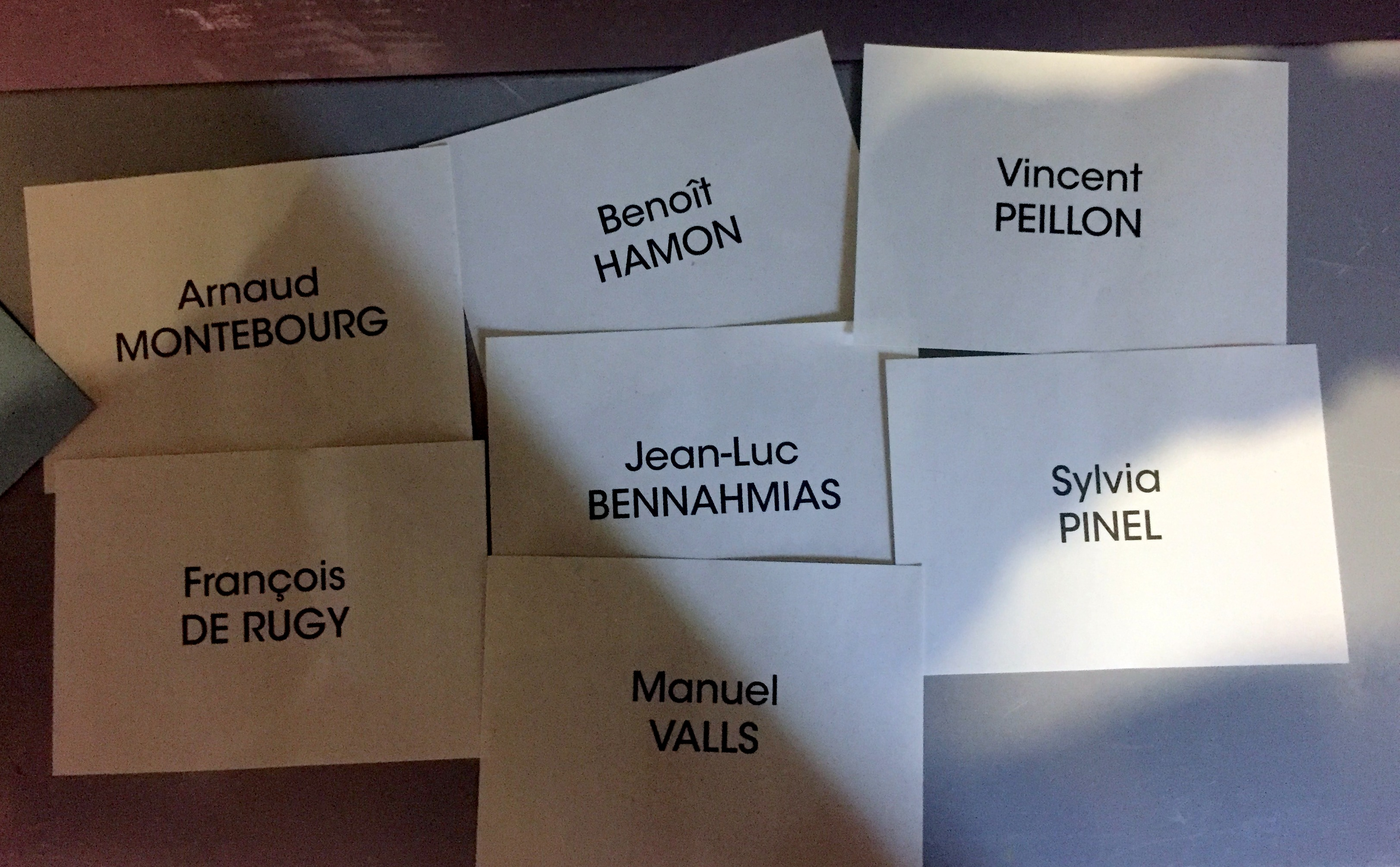 Primaires de la gauche en France en janvier 2017.